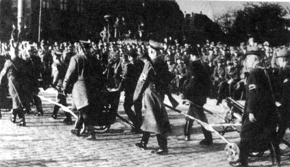 defilada Volkssturmu, listopad 1944; karabiny maszynowe z DWM